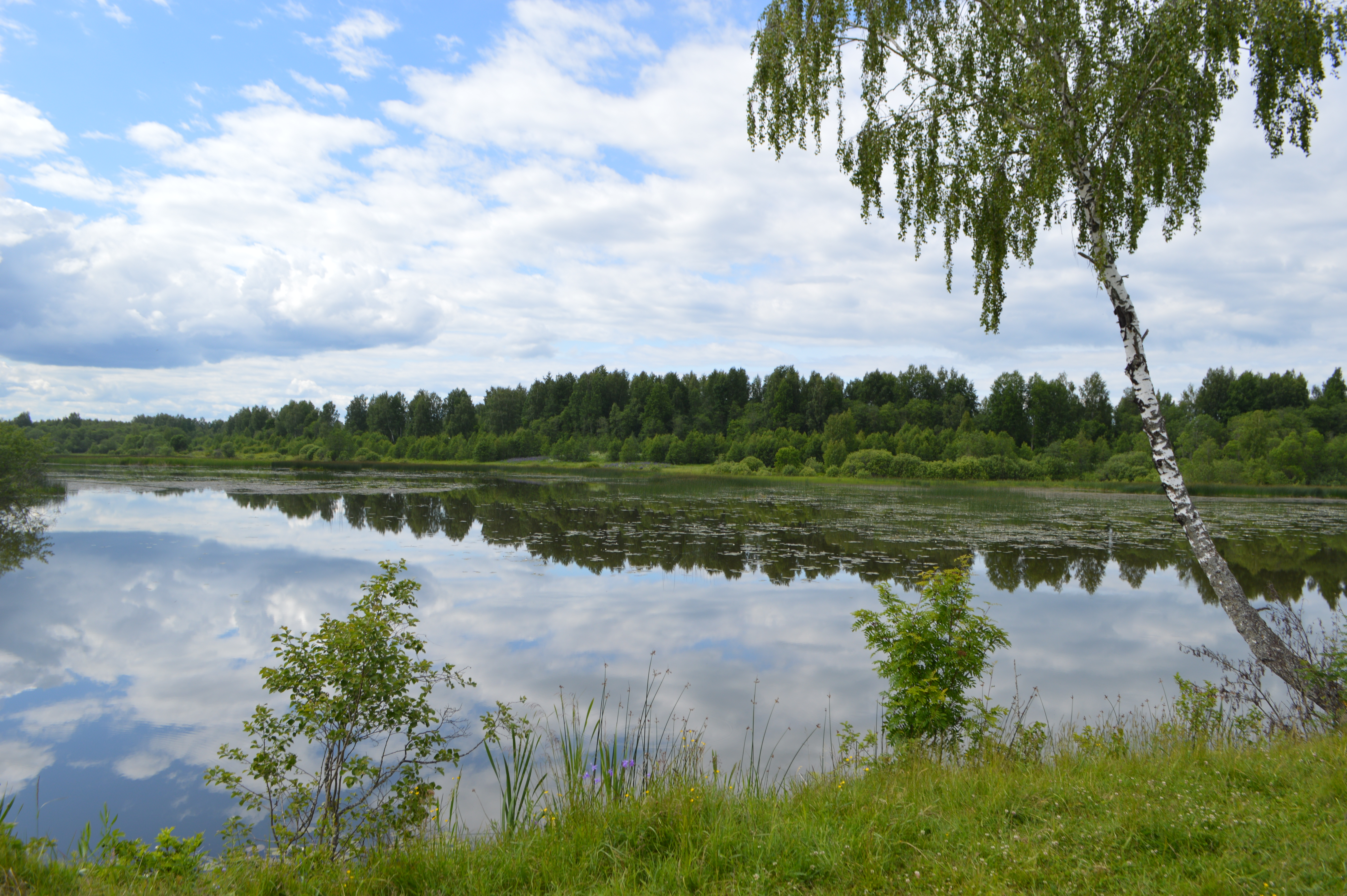 Искусственный пруд в д. Беленино: Сафоновский район, Смоленская область This image is related to the protected area of Russia number 6720127